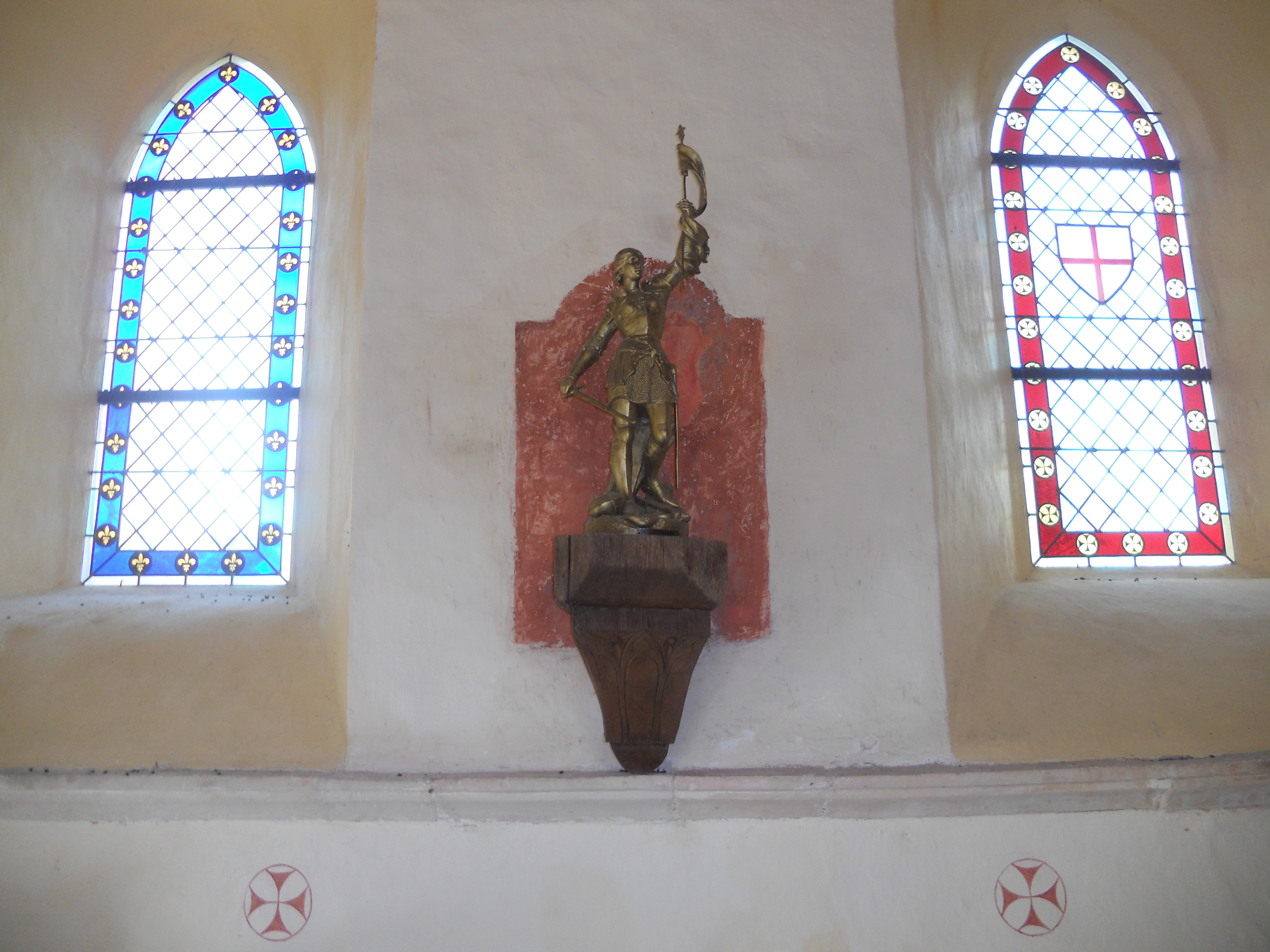 Intérieur de la chapelle Saint Ortaire, propriété privée. Normandie.